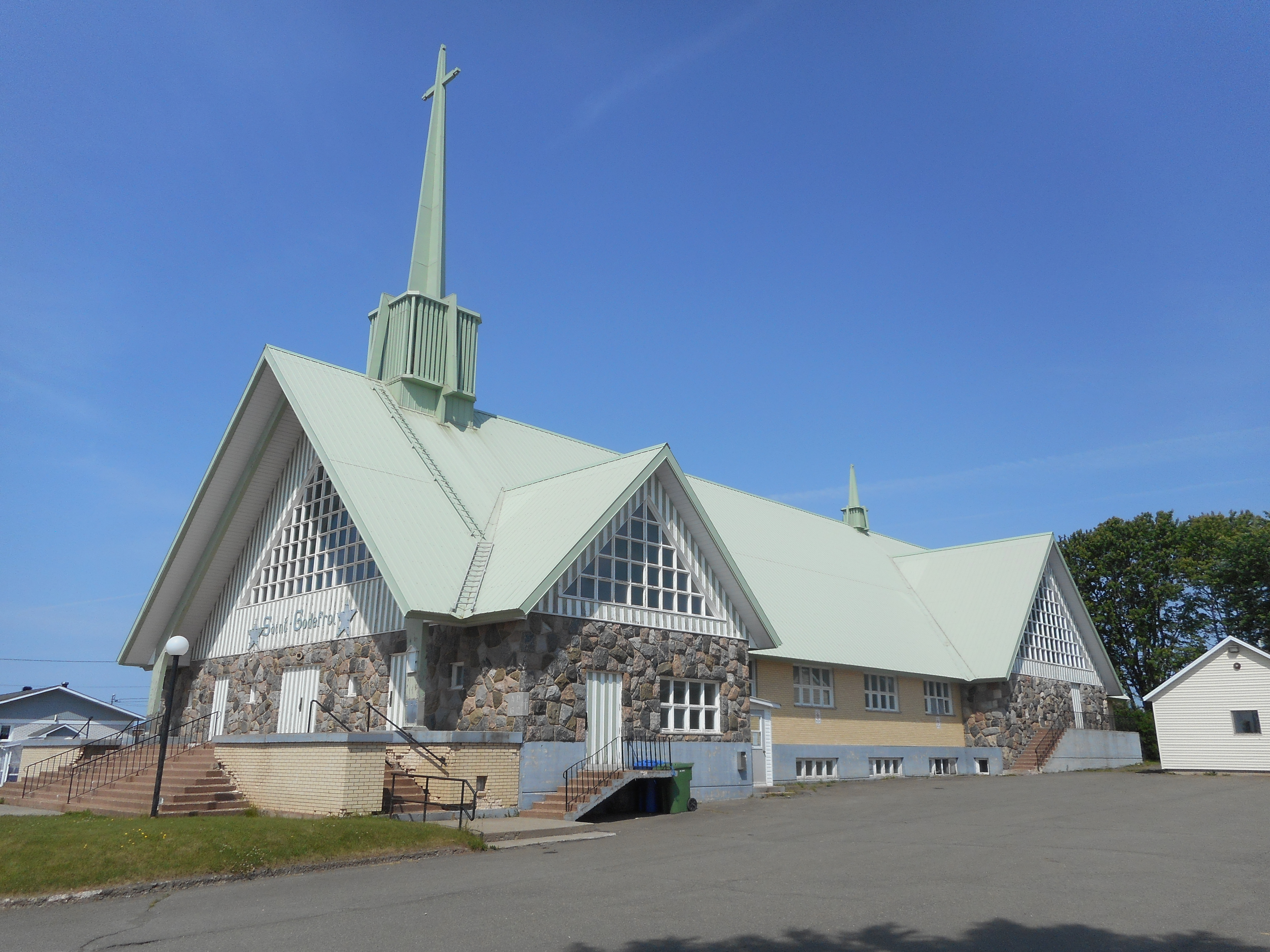 Église de Saint-Godefroi, route 132, Saint-Godefroi, Québec